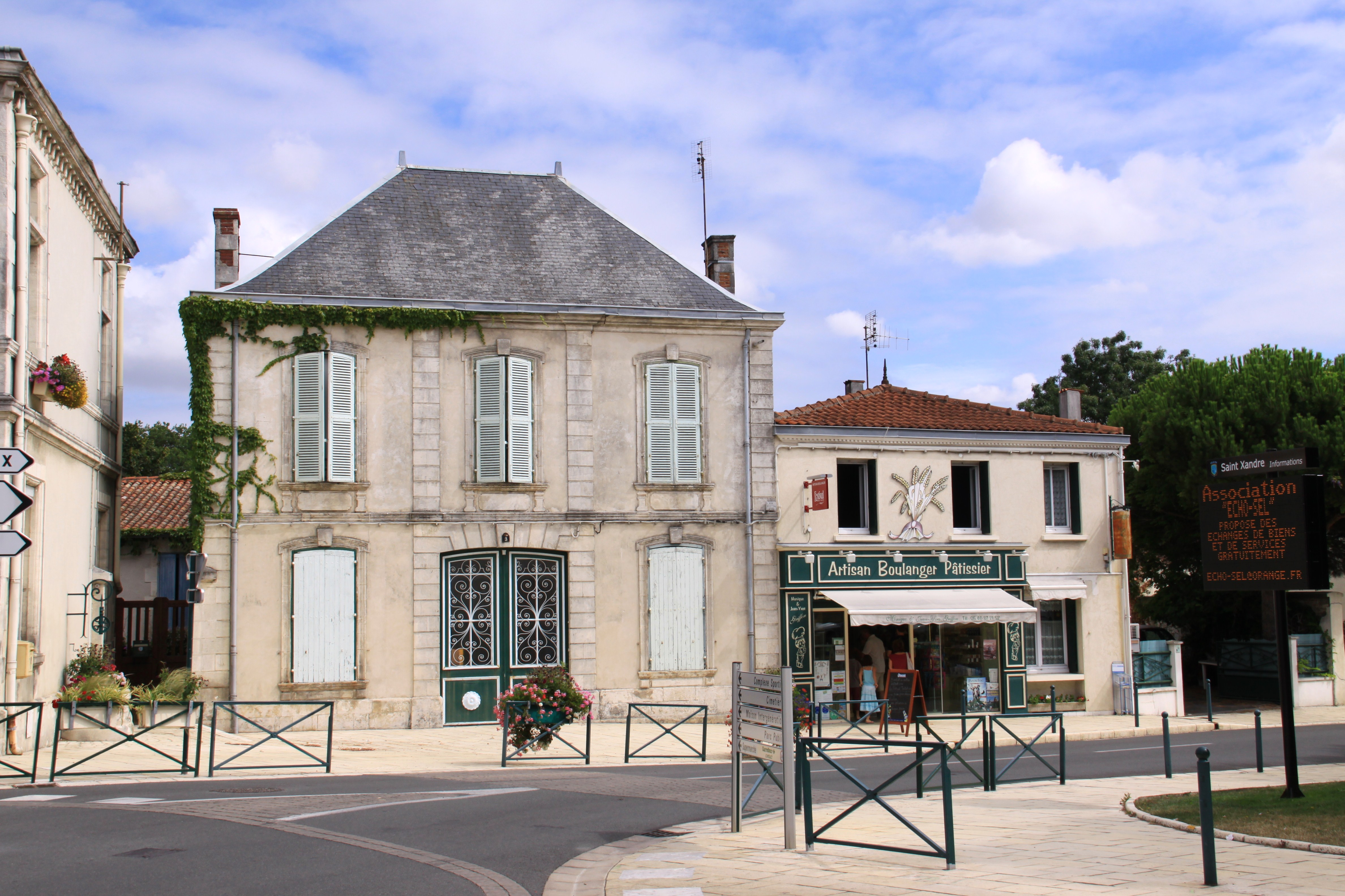 Une maison bourgeoise et la boulangerie-pâtisserie Griffon sises respectivement 3 et 5 rue de Marans, près de la mairie. Saint-Xandre (communauté d' Agglomération de La Rochelle), Charente Maritime, France.